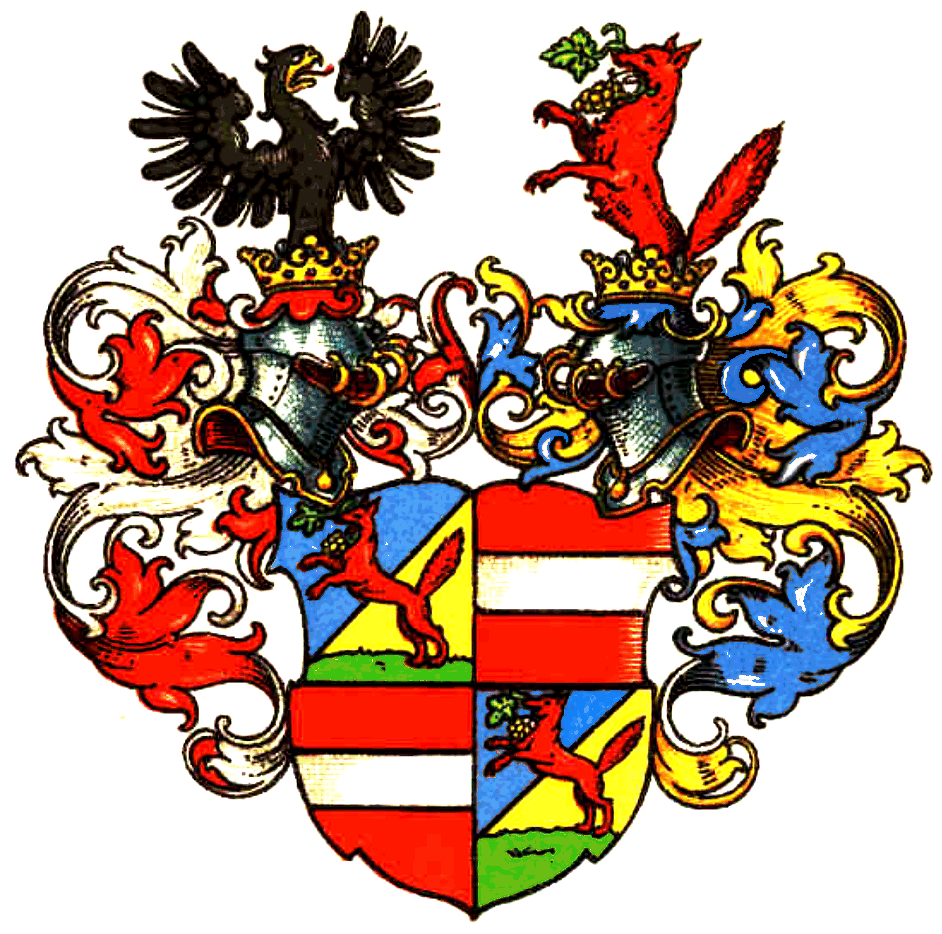 Gemehrtes Wappen der von Jena von 1663